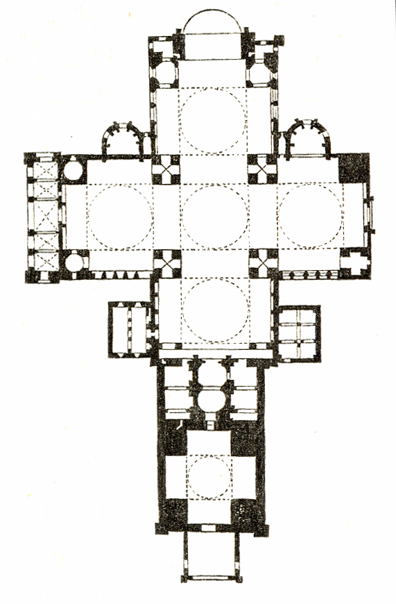 Zeichnung aus dem Jahrbuch der kaiserl. königl. Central-Commission zur Erforschung und Erhaltung der Baudenkmale III. 1859. 1-104. Zuordnung entsprechend Dateinamen August Ottmar Essenwein (1831–1892) Description German architect and writer Date of birth/death2 November 183113 October 1892Location of birth/deathKarlsruheNurembergAuthority control VIAF: 51804595 LCCN: n86016586 GND: 119022192 BnF: cb12551826g ULAN: 500014044 ISNI: 0000 0001 1062 3760 WorldCat WP-Person